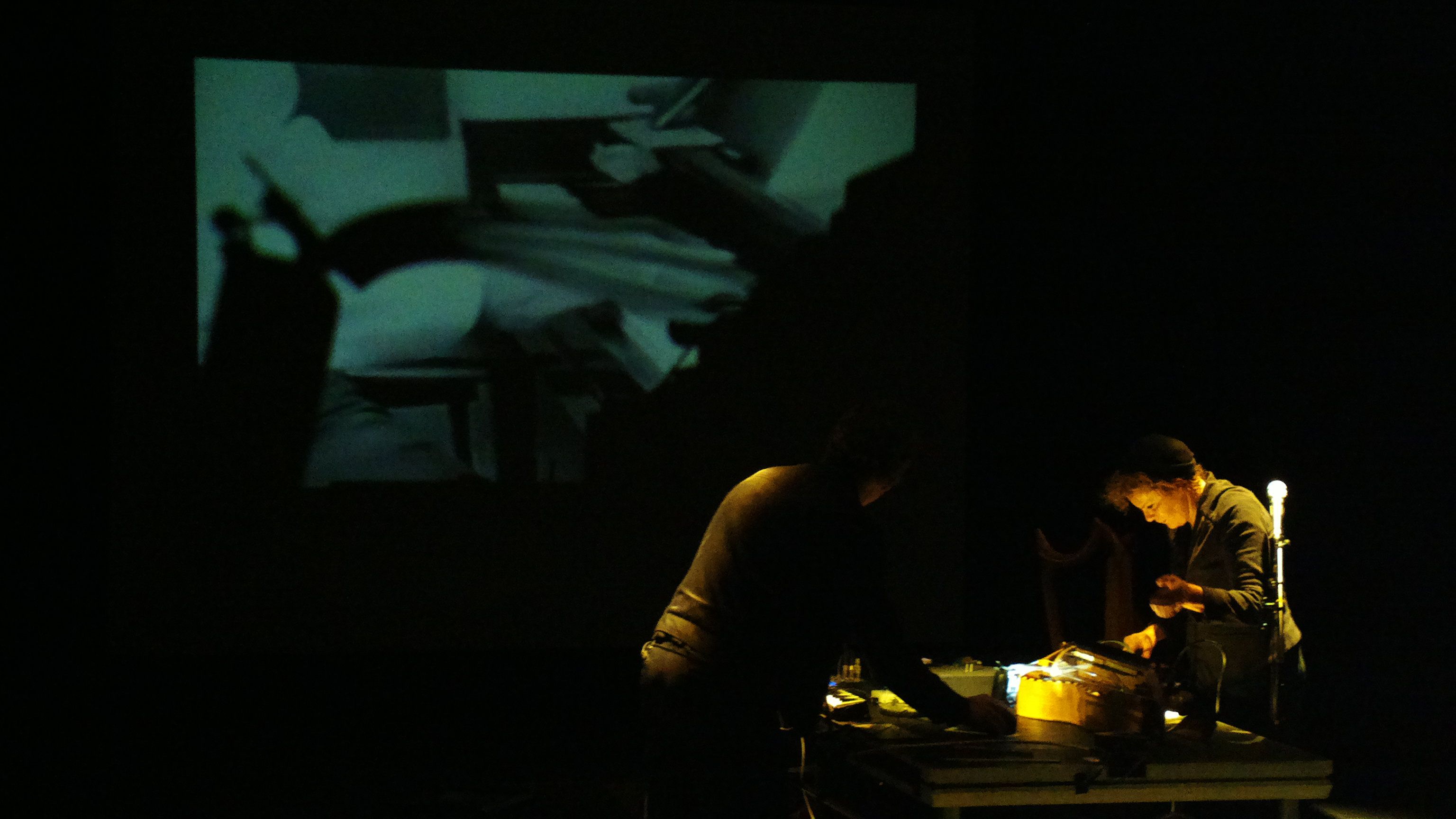 1ère de MOTUS POCUS de Pierre Bastien & Emmanuelle Parrenin à la semaine du bizarre au Théâtre Berthelot à Montreuil (Seine-Saint-Denis)